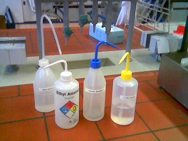 verschiedene Plastik-Spritzflaschen, selbst fotografiert